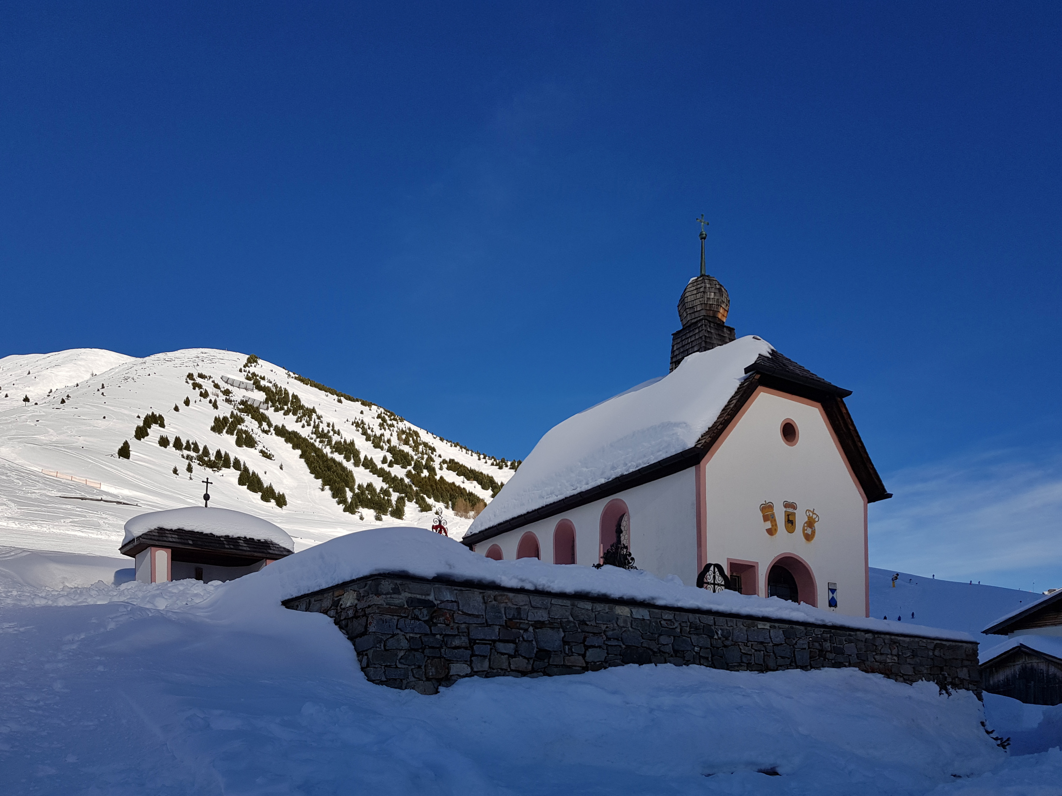 Kapelle Kühtai. Erzherzog Leopold V. ließ die bestehende alte hölzerne Kapelle in seiner Regierungszeit in eine gemauerte umwandeln. In den Jahren 1933, 1958 und 1990 wurde sie restauriert; dabei ist die Fassadenmalerei aus der Barockzeit abhanden gekommen. Seit gut 100 Jahren findet die Kapelle als Aufbahrungsort für tödlich Verunglückte in den Bergen Verwendung. This media shows the remarkable cultural object in the Austrian state of Tyrol listed by the Tyrolean Art Cadastre with the ID 20190. (on tirisMaps, pdf, more images on Commons, Wikidata)